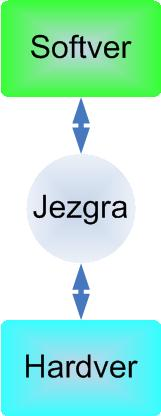 Slika jezgre i odnosa prema softveru i hardveru